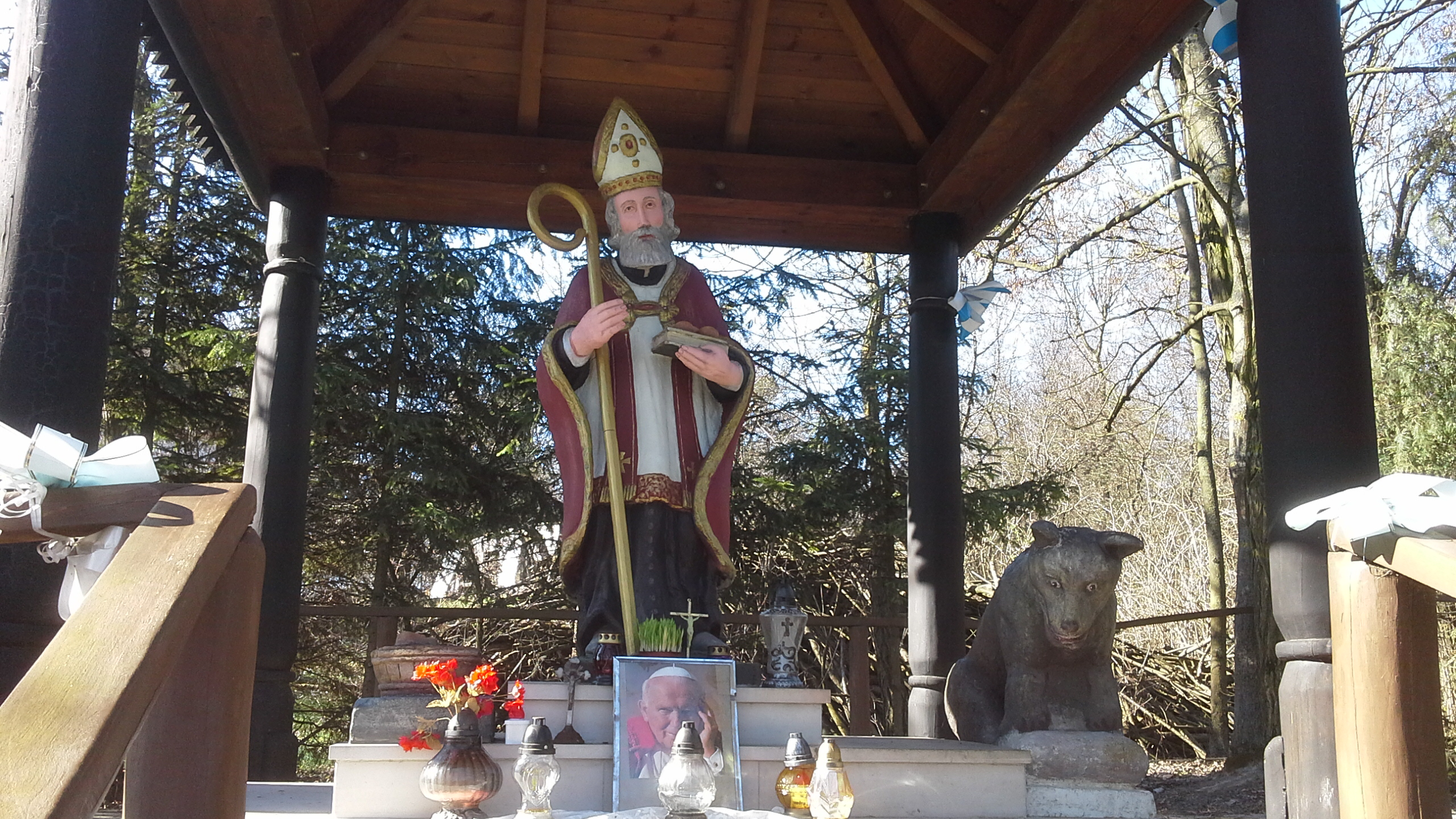 Święty Mikołaj z wilkiem - sanktuarium w okolicach Kryłowa